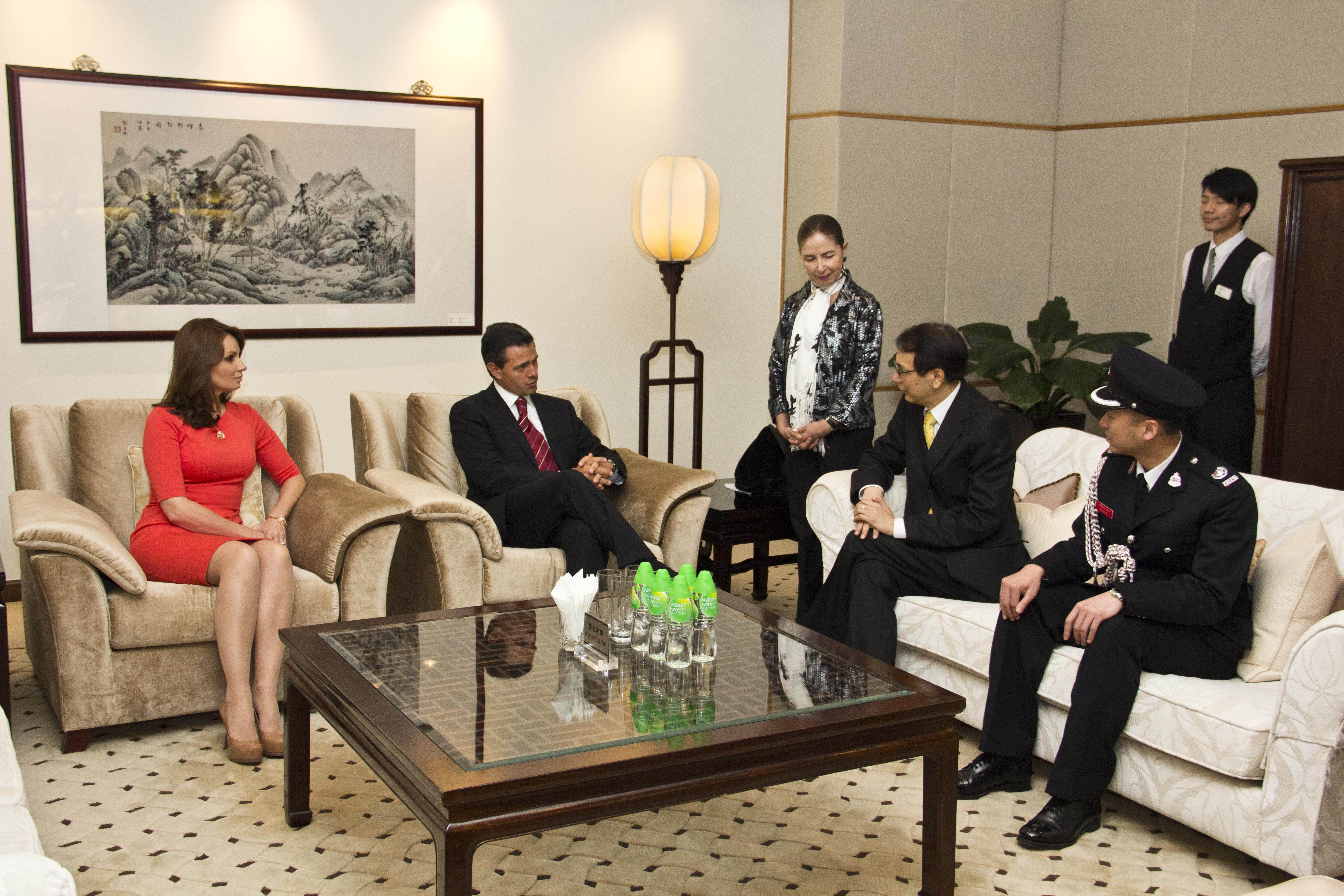 Visita Oficial a la República Popular China. Hong Kong, China. 5 de abril de 2013.